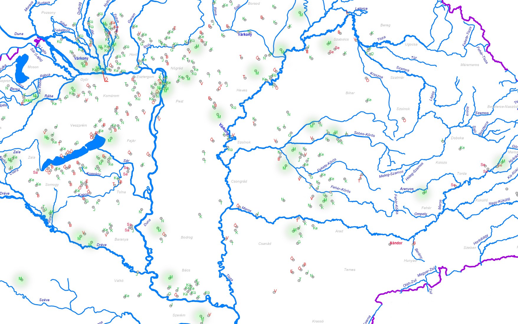 A megyer törzsnév elterjedése a Kárpát-medencében